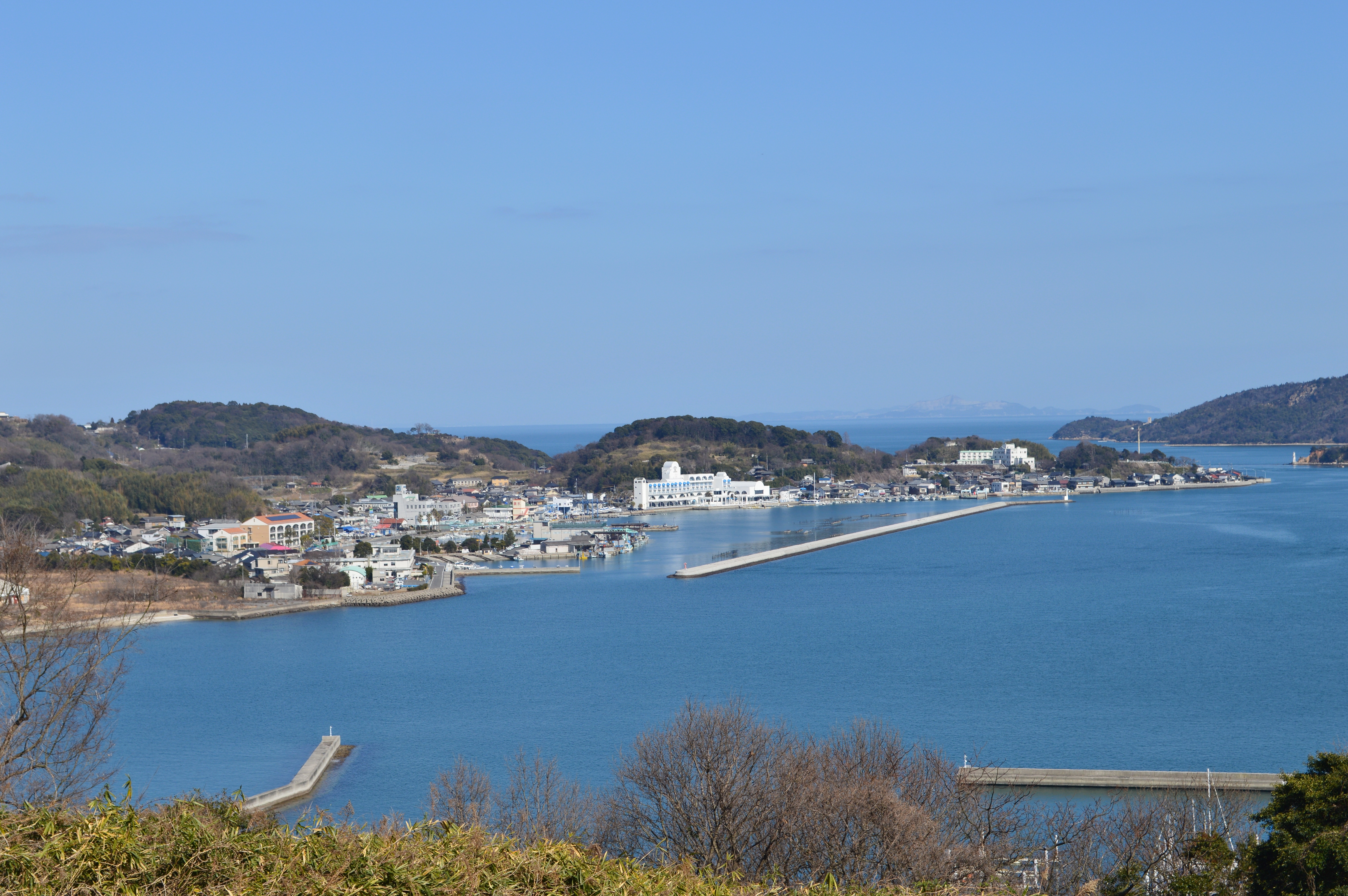 牛窓湾 (鹿歩山から望む)